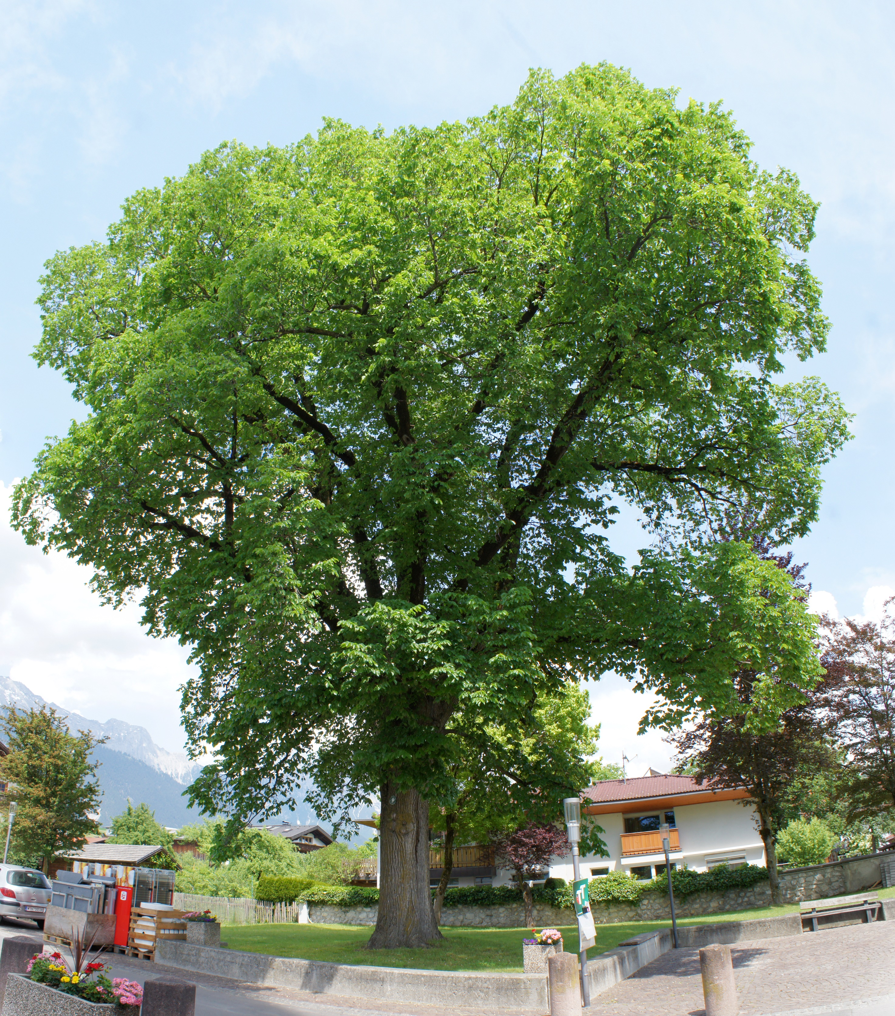 Ulme in Untermieming This media shows the natural monument in the Tyrol with the ID ND_2_4.